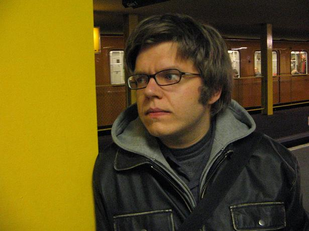 Der Schriftsteller Martin Becker im Jahr 2007.